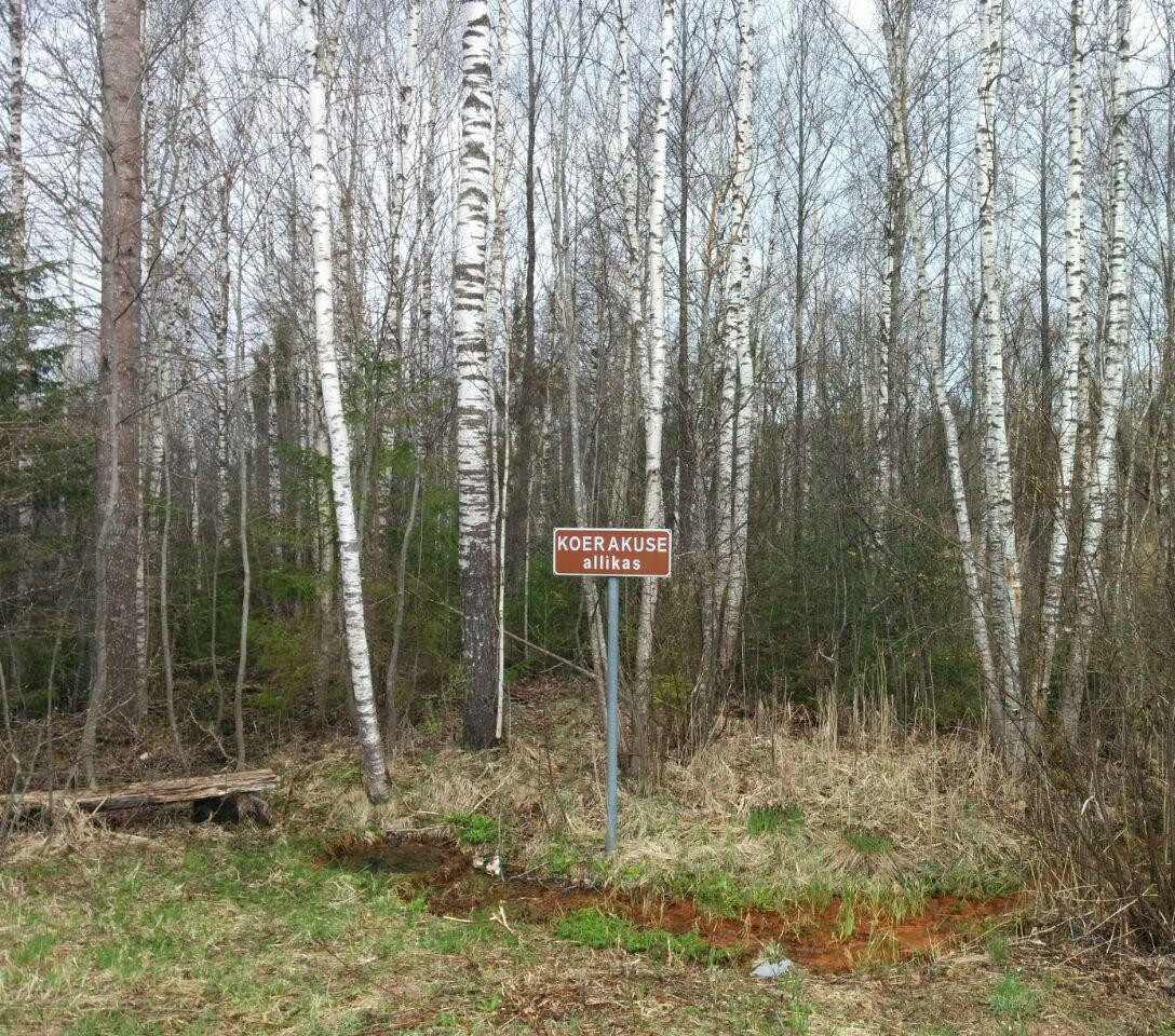 Koerakuse allikas